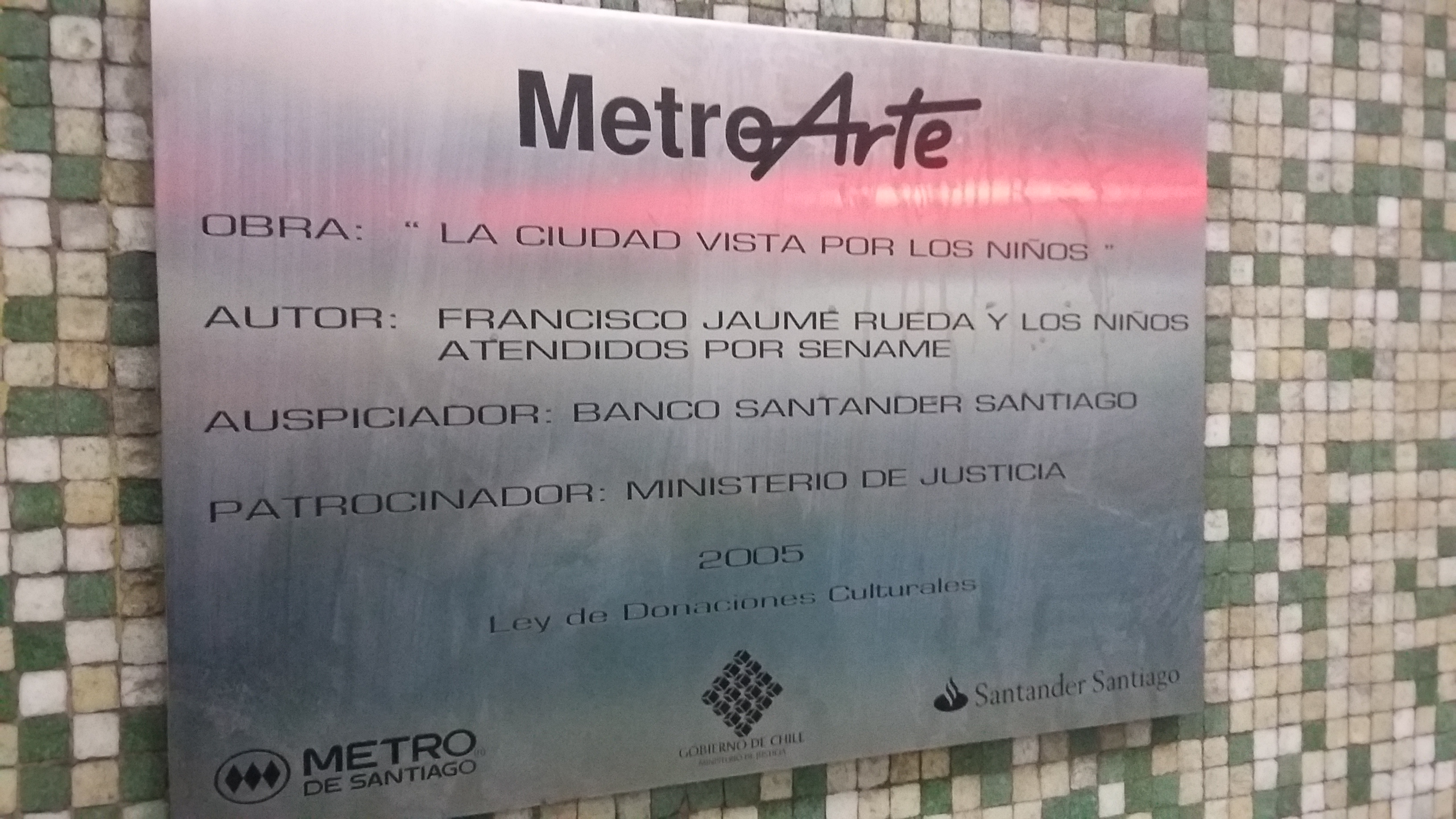 Placa MetroArte 2005 en conmemoración de la obra "La ciudad vista por los niños" por Francisco Jaume Rueda y los niños del SENAME